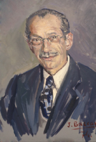 Imagen de el Dr. José Ignacio Barraquer Moner